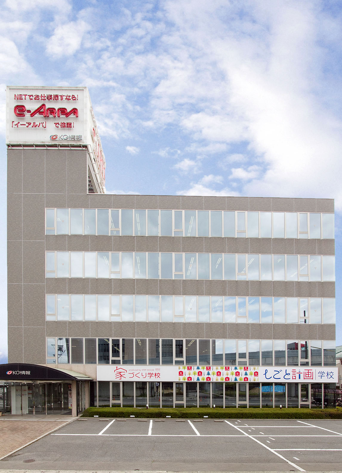 KG情報 本社外観